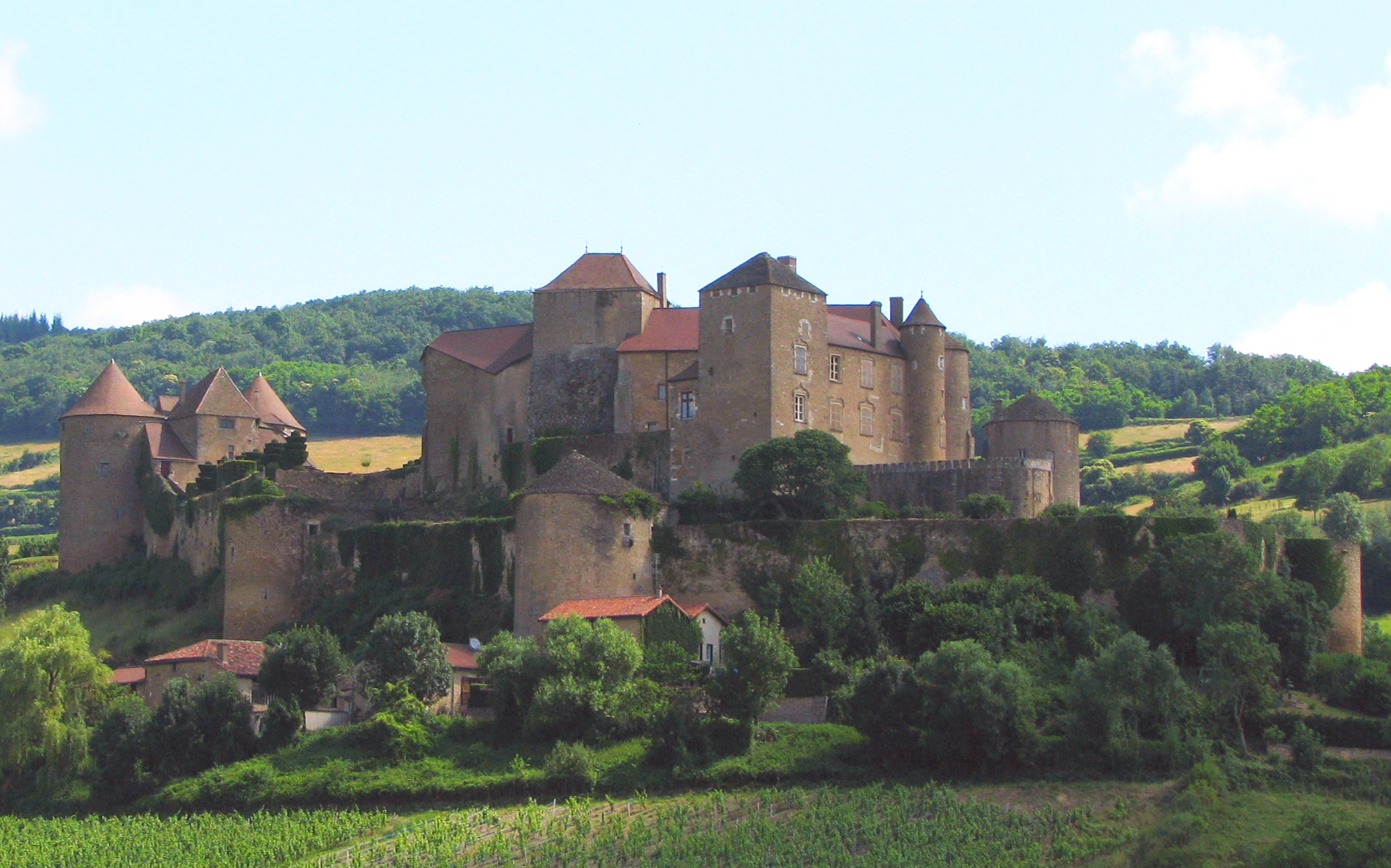 Château de Berzé-le-Châtel nahe der Ortschaft Berzé-le-Châtel Region Saône-et-Loire in Frankreich - Foto Wolfgang Pehlemann IMG_0476